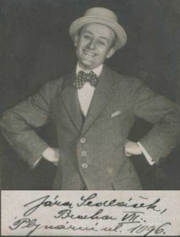 Jára Sedláček (1884 - 1927), Český herec a režisér.